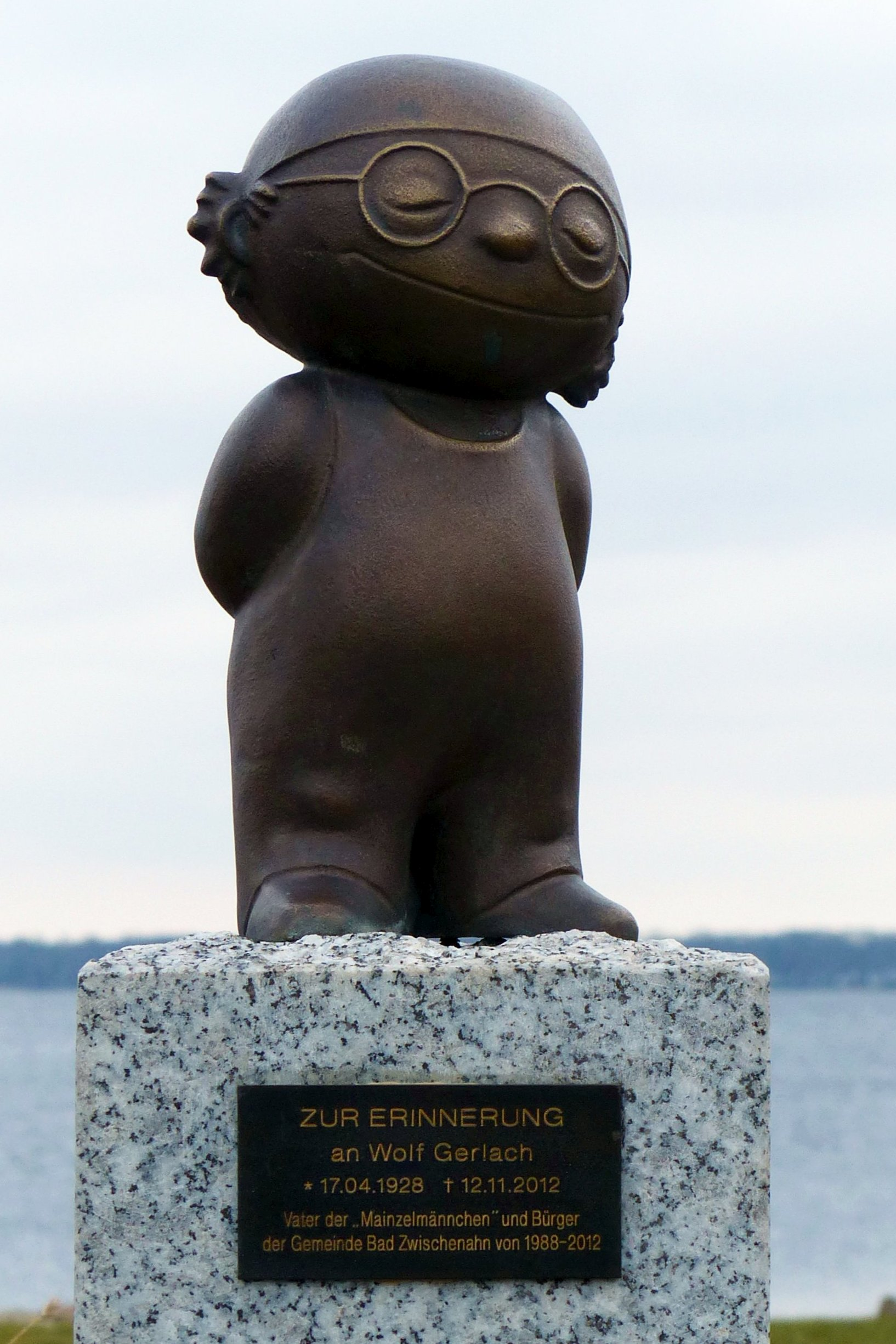 Mainzelmännchen Det - Bronzeskulptur im Kurpark von Bad Zwischenahn zum Gedenken an Wolf Gerlach